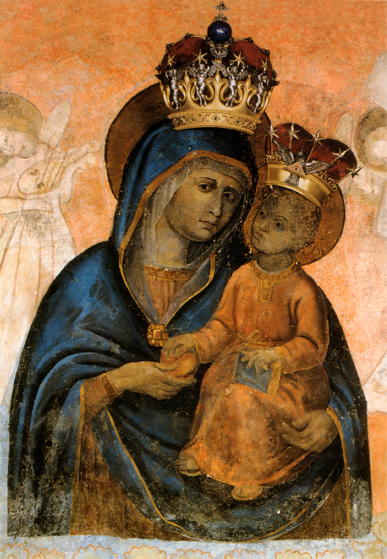 Łaskami słynący obraz Matki Bożej Piaskowej w bazylice oo. Karmelitów w Krakowie